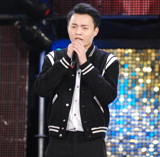 許富凱出席三立電視綜藝節目《超級夜總會》錄影。